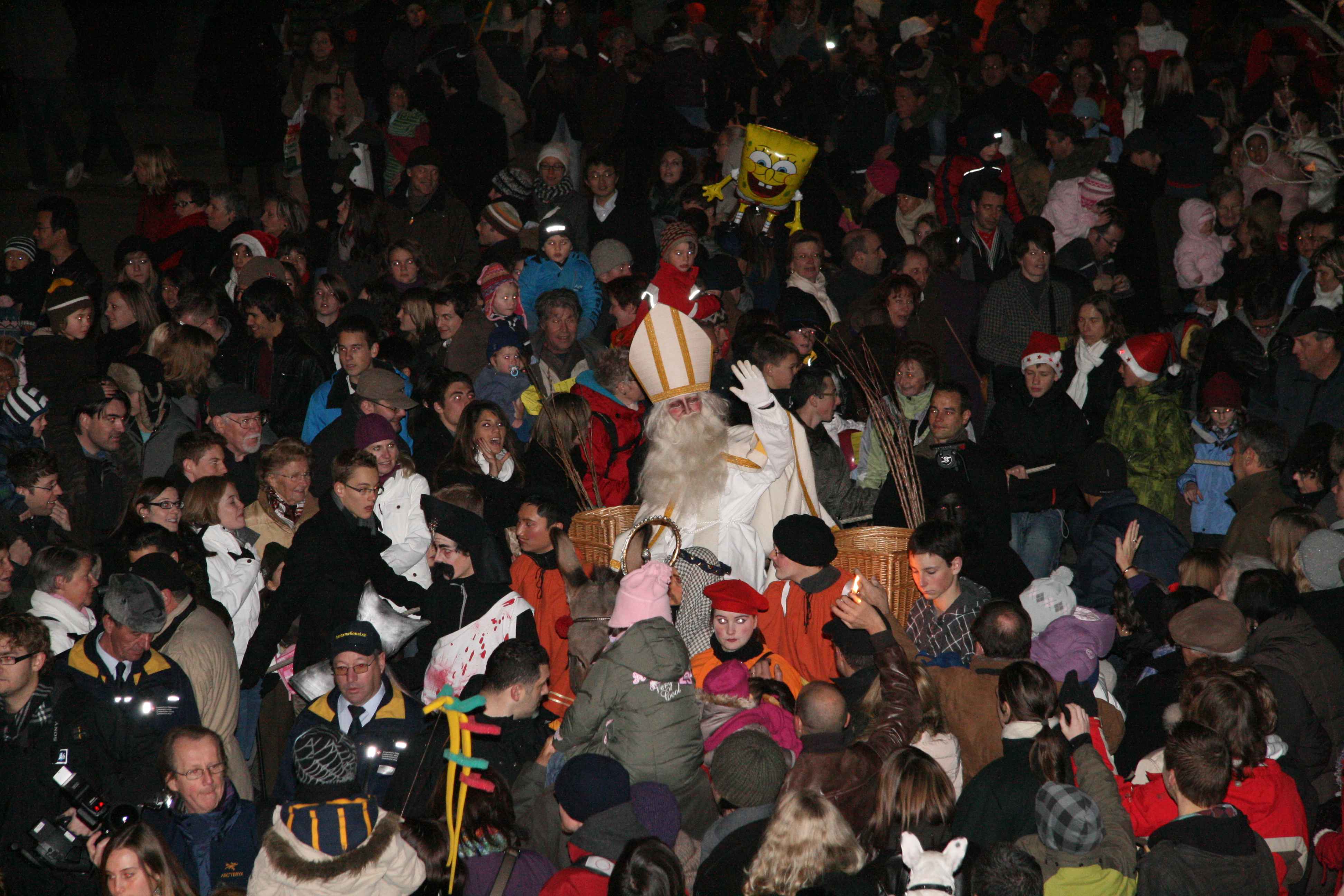 Der St. Nikolaus in der Menschenmasse beim Umzug am 6. Dezember durch die Stadt Freiburg (CH)